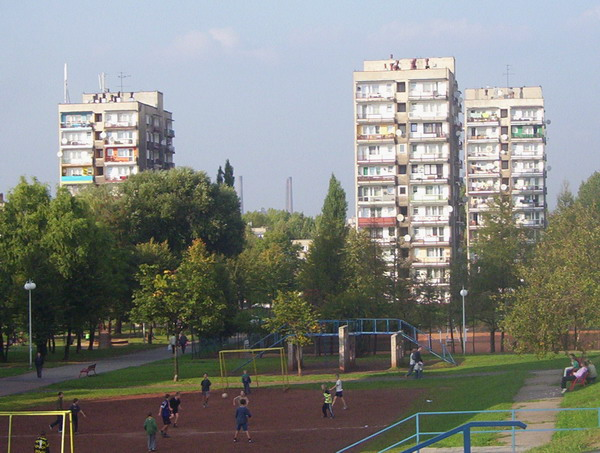 Widok na wieżowce w dzielnicy Godula.